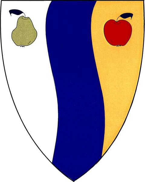 Znak obce Malšovice